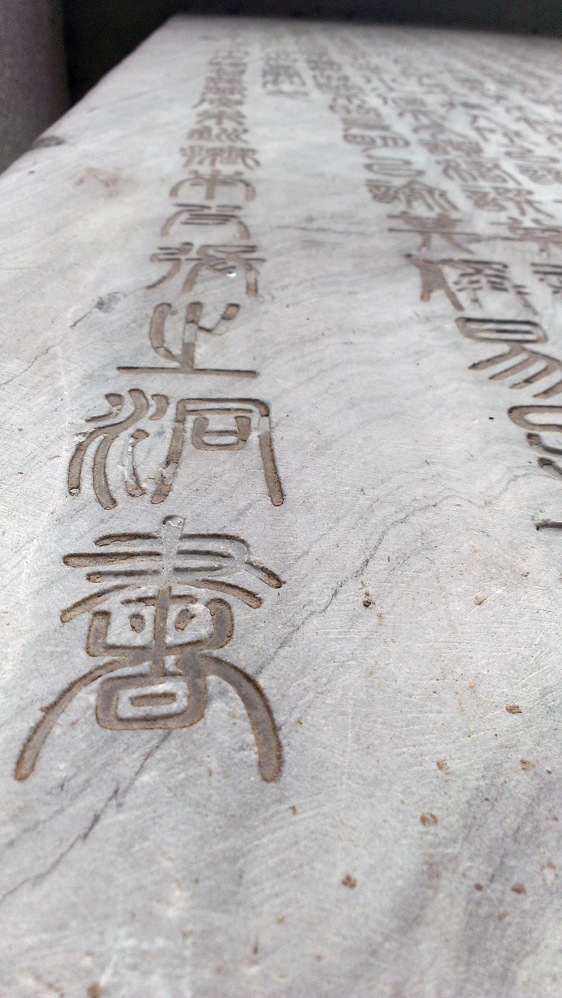 廣東廣雅中學的石碑，張之洞書，文字中的水泥是「文化大革命」時期的痕跡。